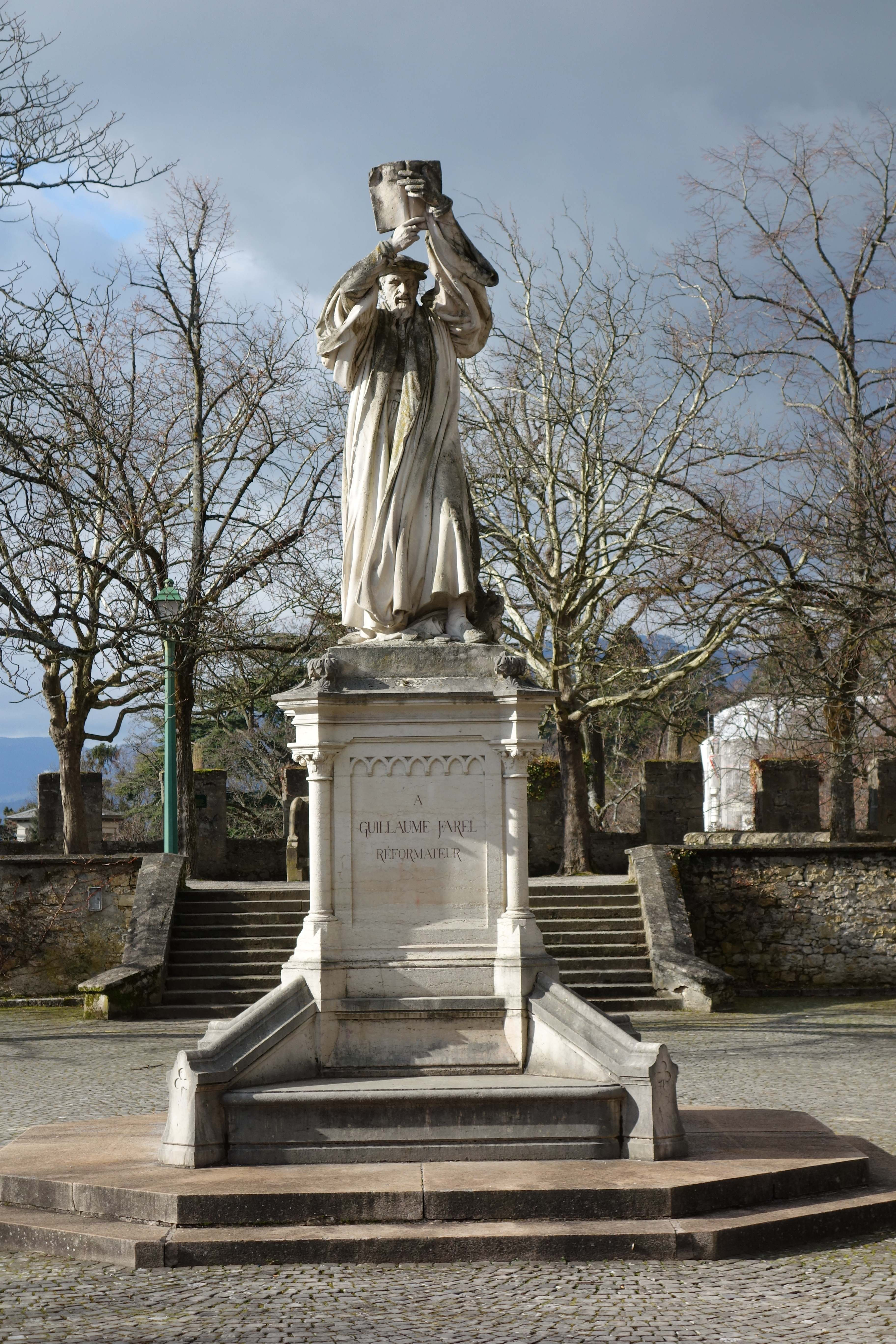 Sur l'esplanade de la Collégiale de Neuchâtel.